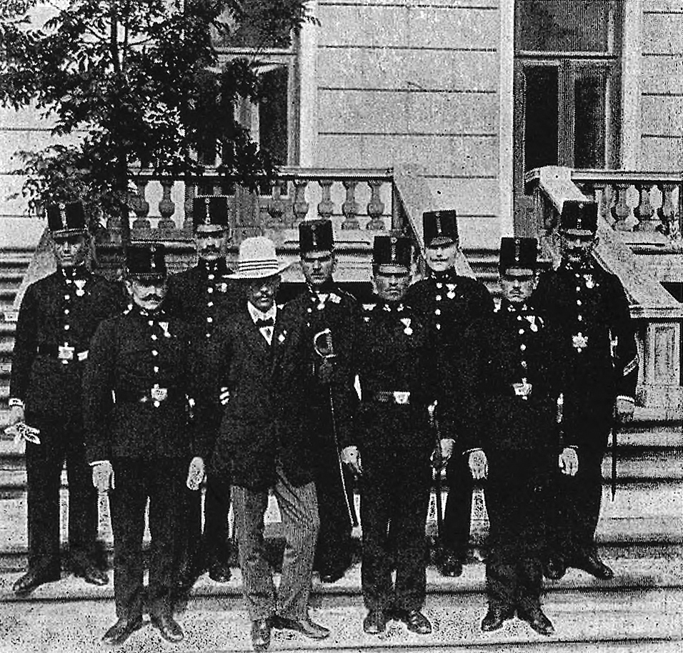 Policanoj-esperantistoj en Krakovo kun sia instruisto Jan Mędrkiewicz